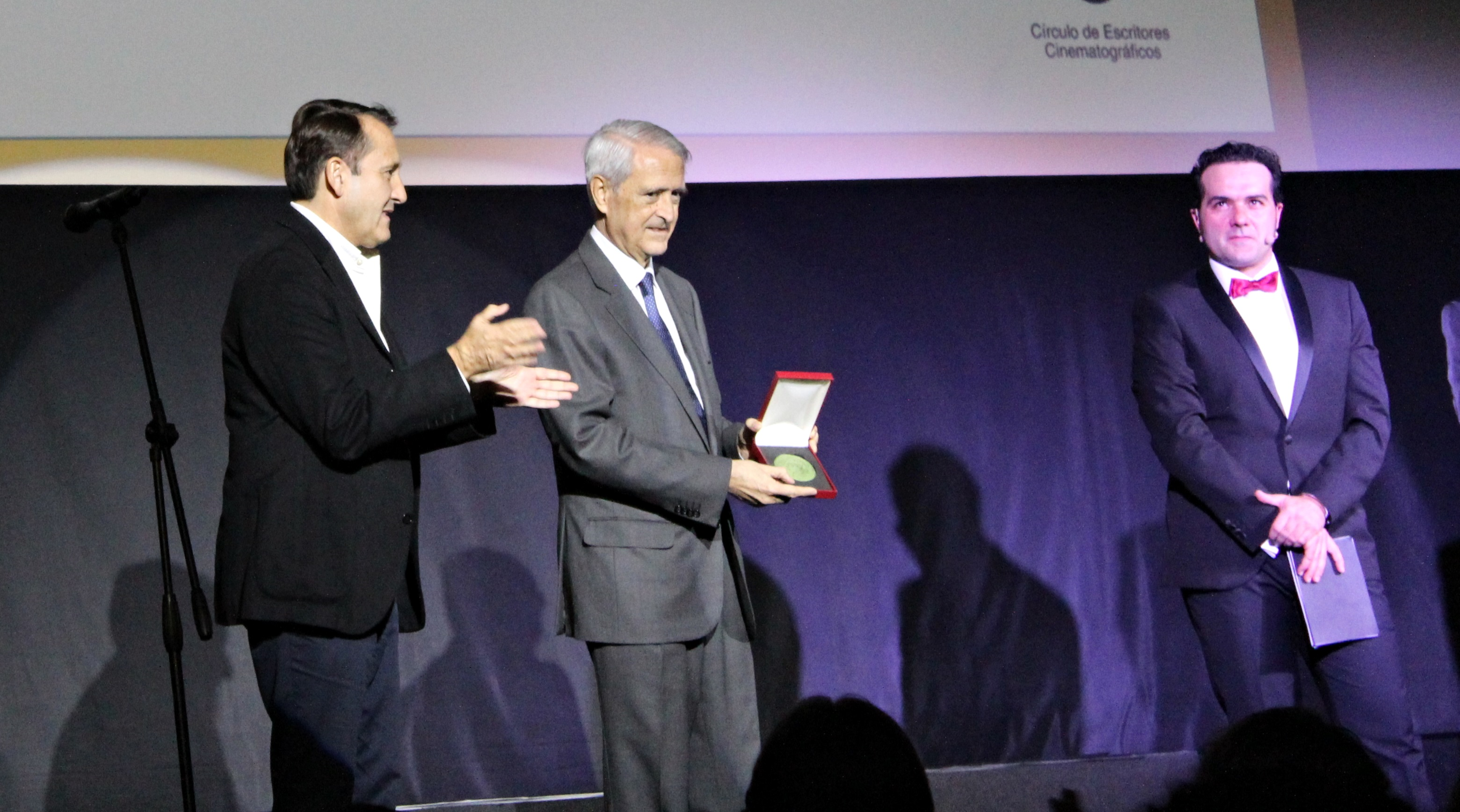 Primitivo Rodríguez recibe la Medalla del Círculo de Escritores Cinematográficos a la labor de promoción del cine.